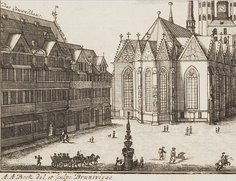 Altstadtmarkt in Braunschweig mit St. Martini, Gewandhaus und Altstadtrathaus. Krambuden, Altstadtmarktbrunnen, Marienbrunnen. Ausschnitt